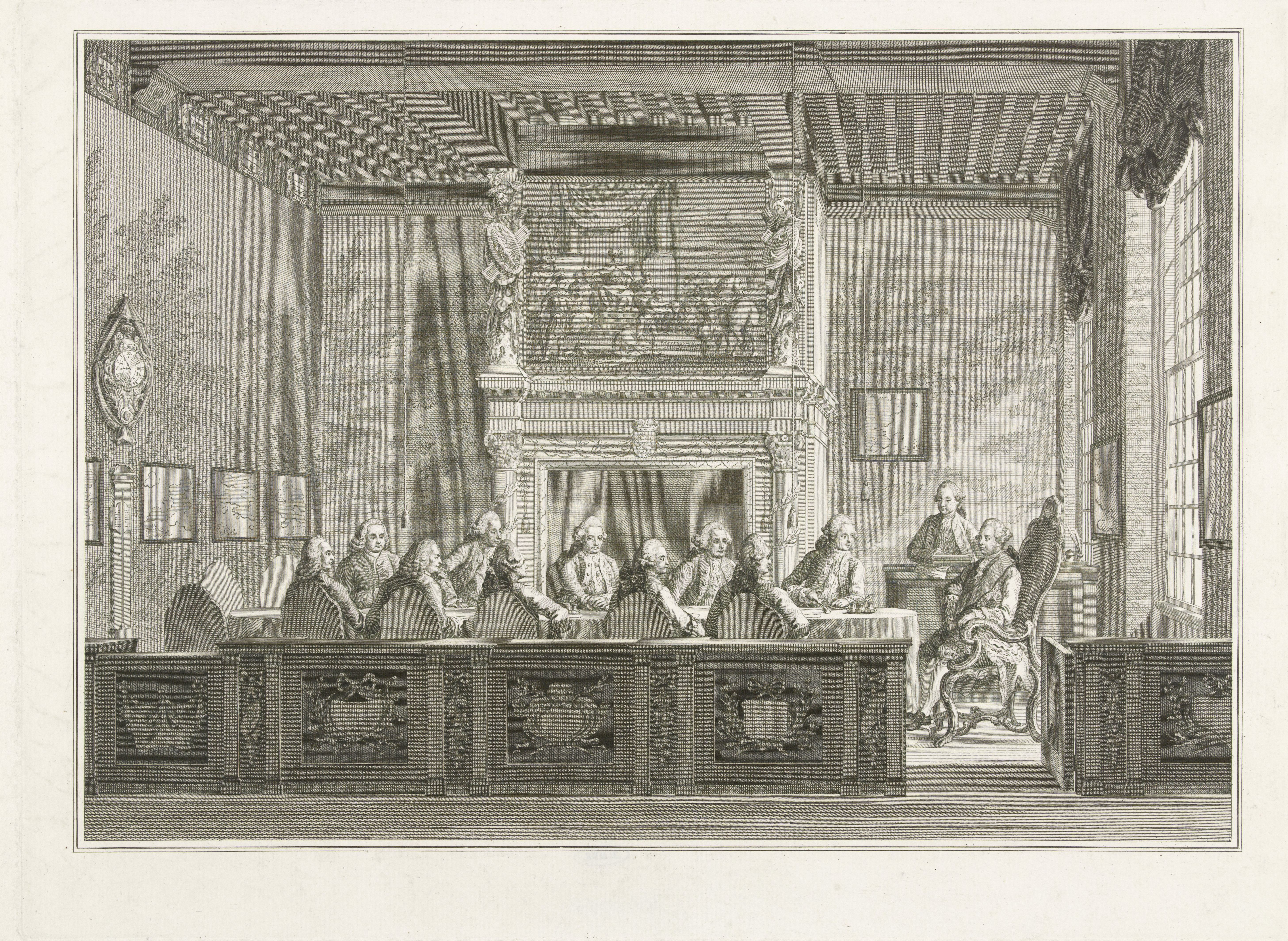 Vergaderzaal van de Admiraliteit Amsterdam en Stadhouder Willem V als Admiraal-Generaal